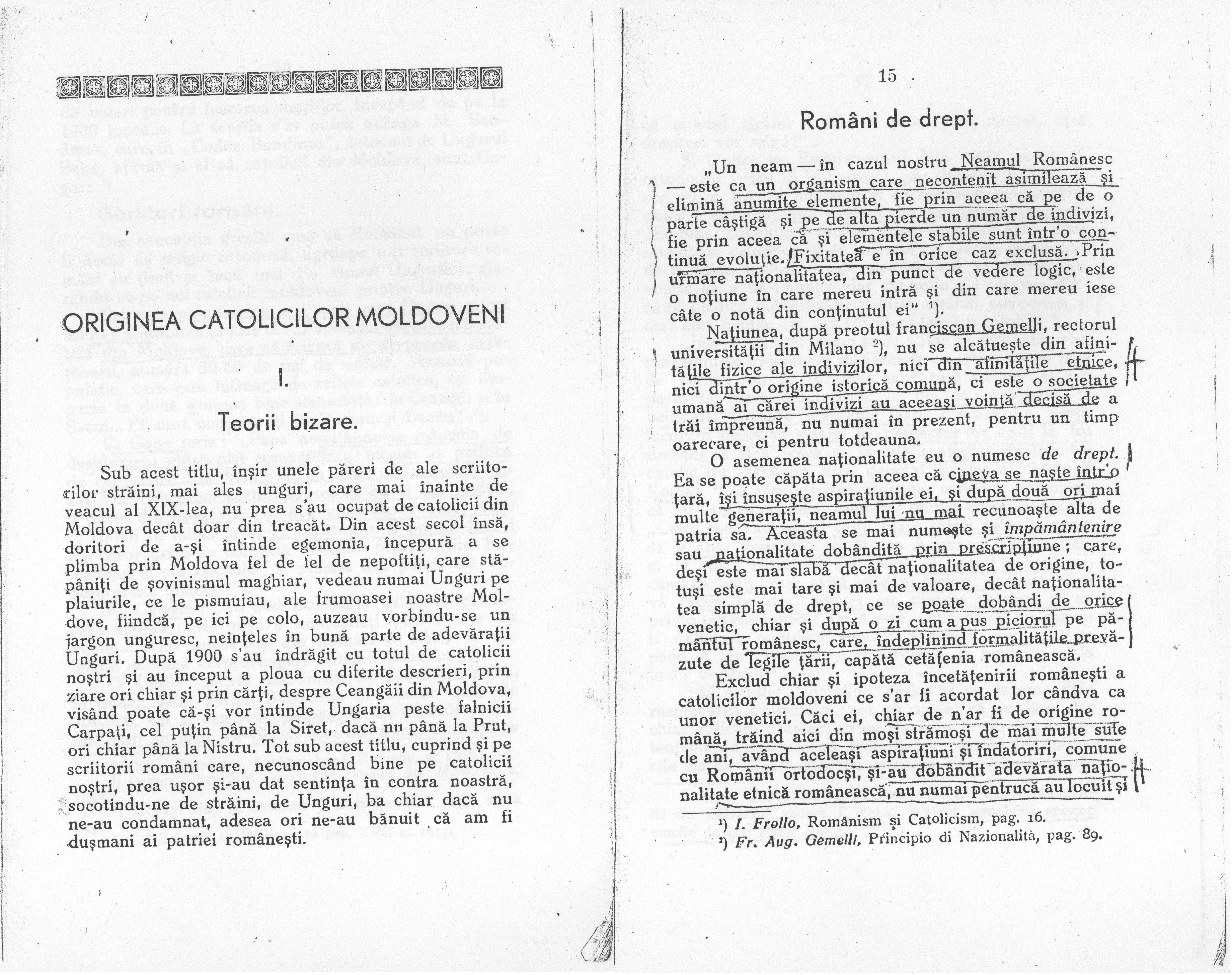 Paginile de introducere la secțiunea despre origini în „Originea catolicilor din Moldova și Franciscanii pastorii lor de veacuri” de Iosif Petru M. Pal, sub titulatura „Teorii bizare” aflându-se teoriile istoricilor unguri (Istvan Györffy și alții) și români (Radu Rosetti, Nicolae Iorga, C.C. Giurescu și alții) iar sub „Români de drept” figurând citate și comentarii. De remarcat citarea preotului romano-catolic Iosif Frollo, legionar și simpatizant al lui Corneliu Zelea Codreanu și A. C. Cuza.